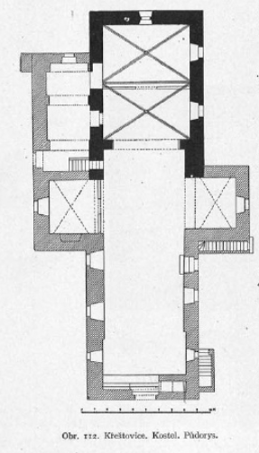 Půdorys kostela sv. Jana Křtitele v Chřešťovicích